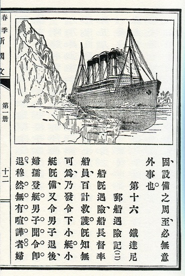 泰坦尼克号见于中华民国教科书《共和国教科书·新国文·初小》。